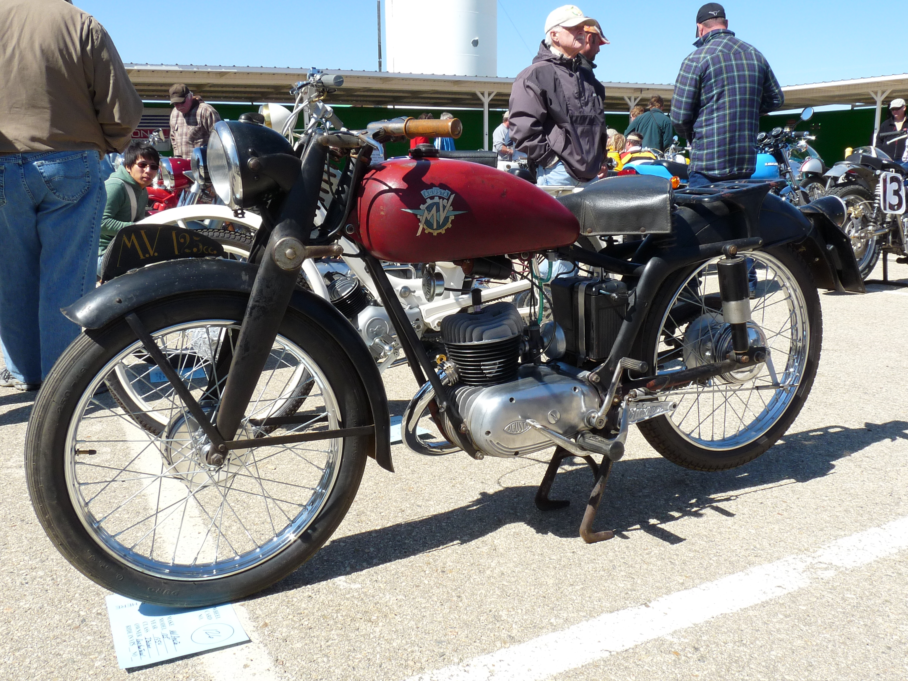 MV Agusta 125 2T del 1954